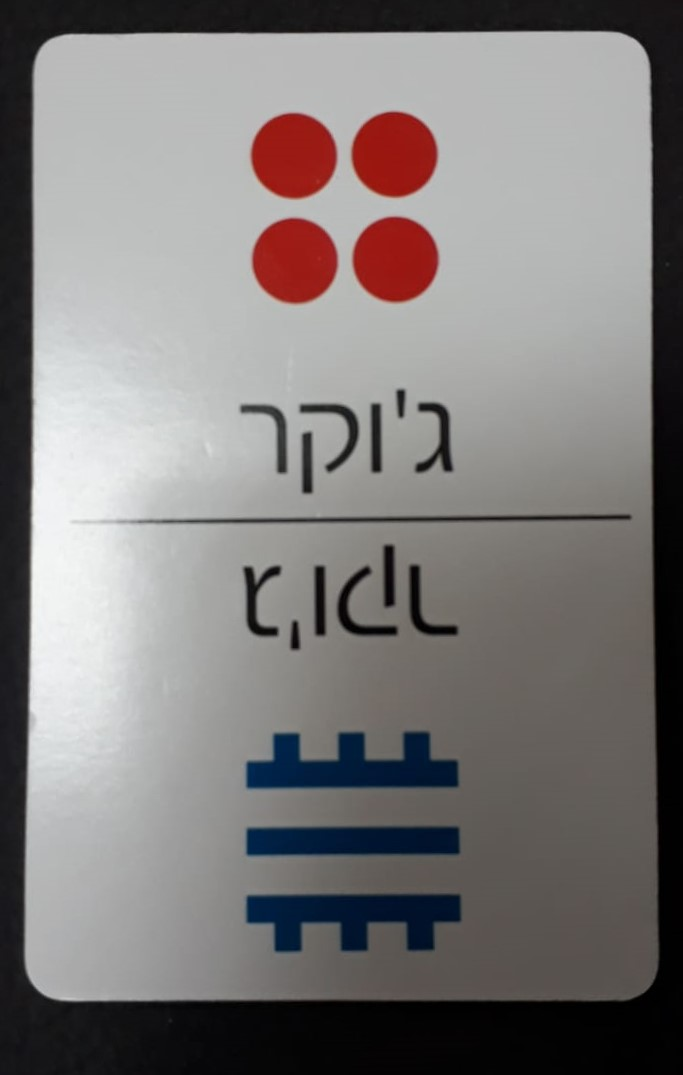 קלף משחק ג'וקר של משחק הקופסא אנומיה